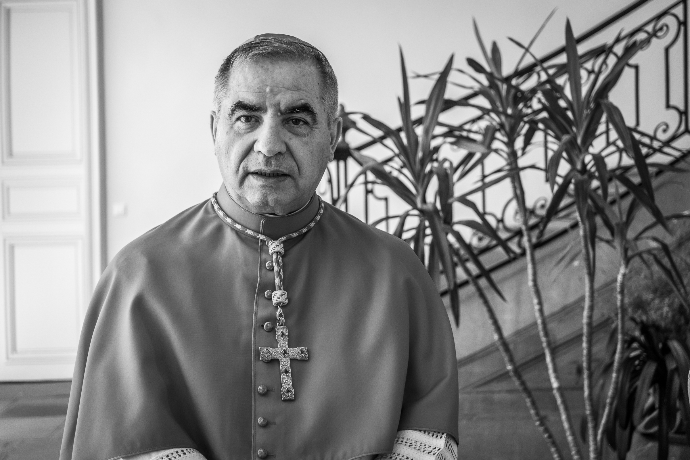 Giovanni Angelo Becciu par Claude Truong-Ngoc